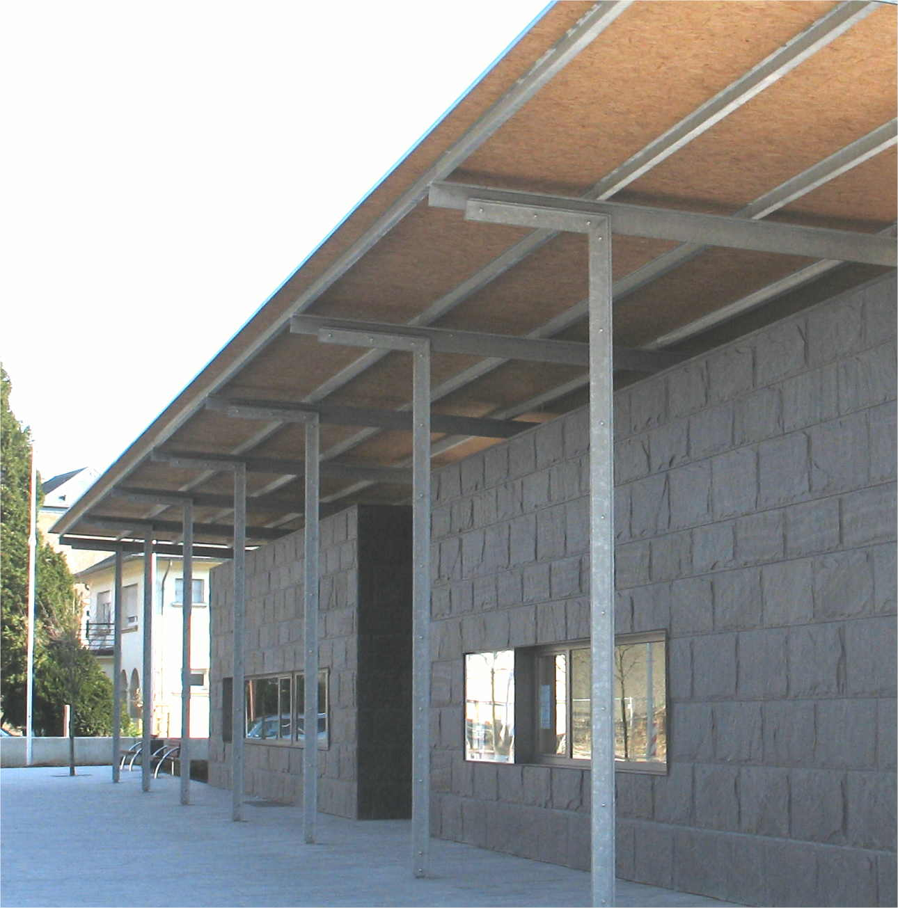 Gemengenhaus vun der Gemeng Dippech zu Schuller (März 2006)